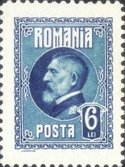 Source: Post of Romania